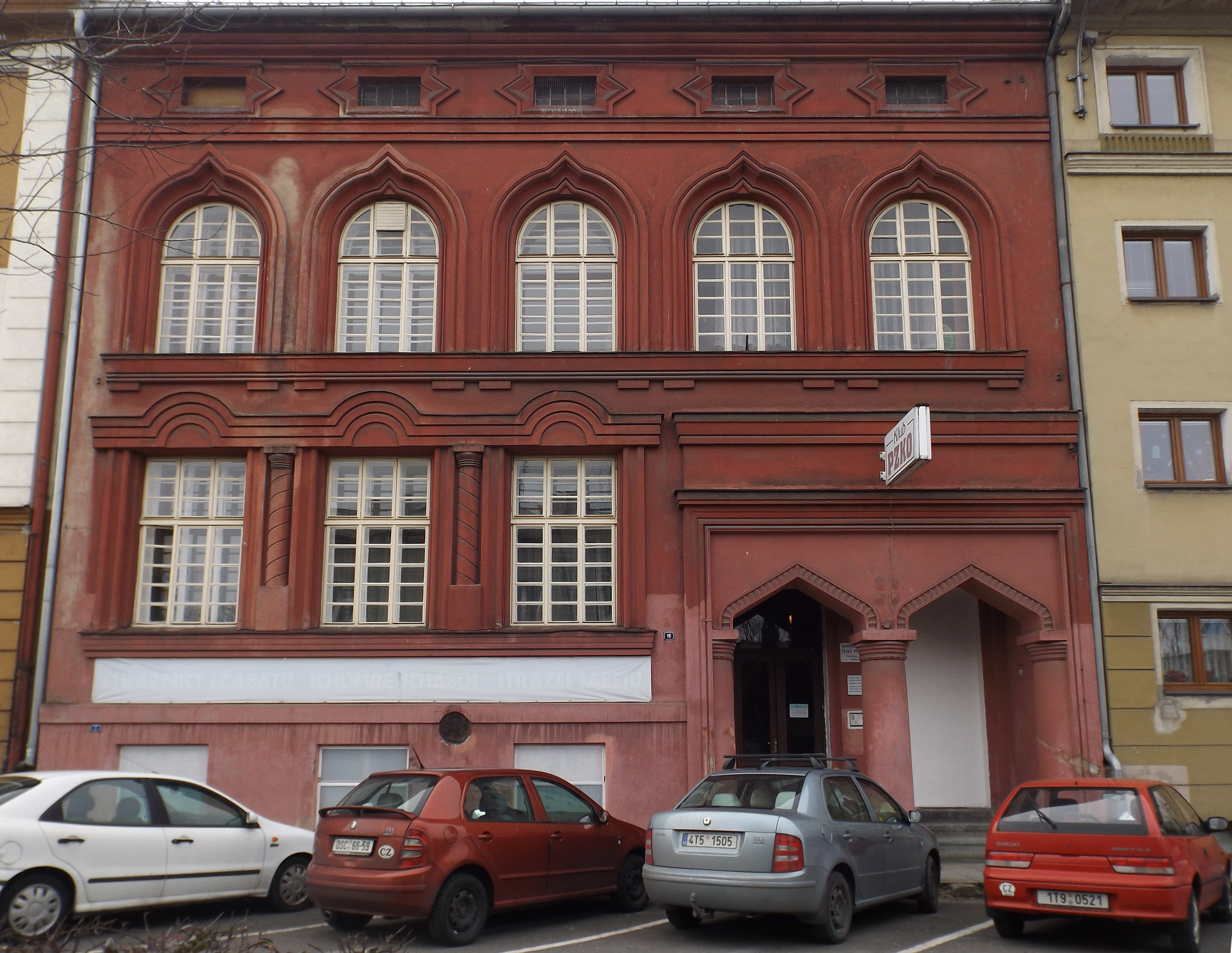 Former synagogue in Český Těšín